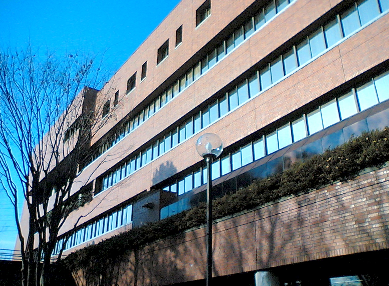 Hino-City Hall(Hino-shi, Tokyo, Japan)